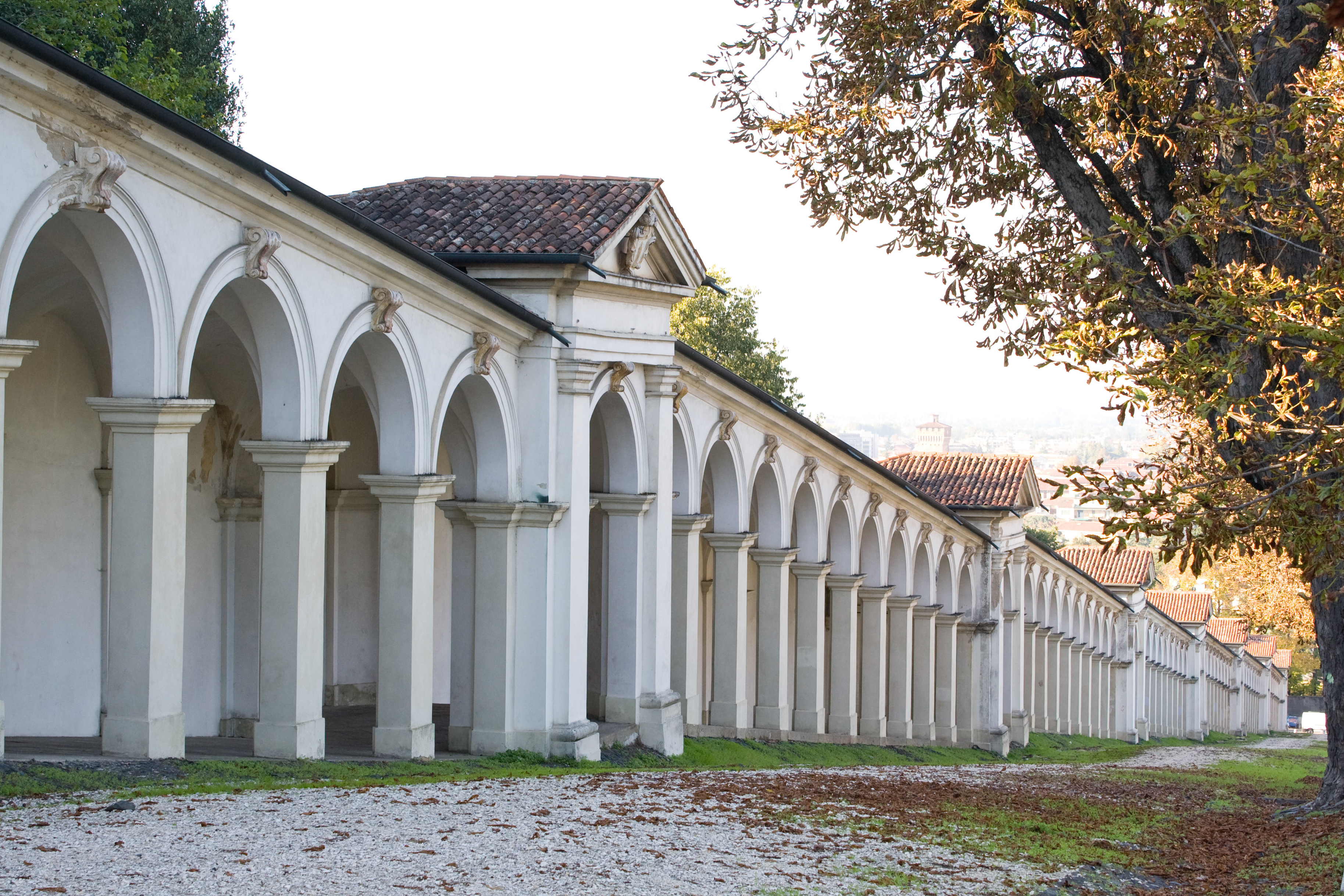 Vicenza - Monte Berico - Portici